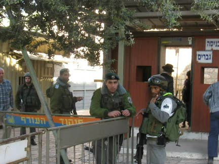 ביקור במערת המכפלה